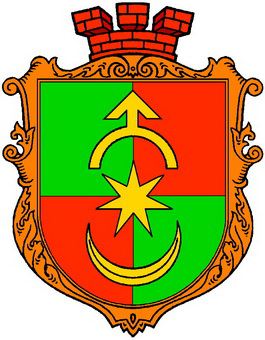 Герб с. П'ятка